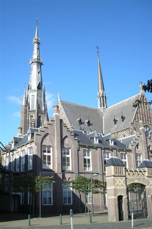 Sint-Bonifatiuskerk (church) in Leeuwarden